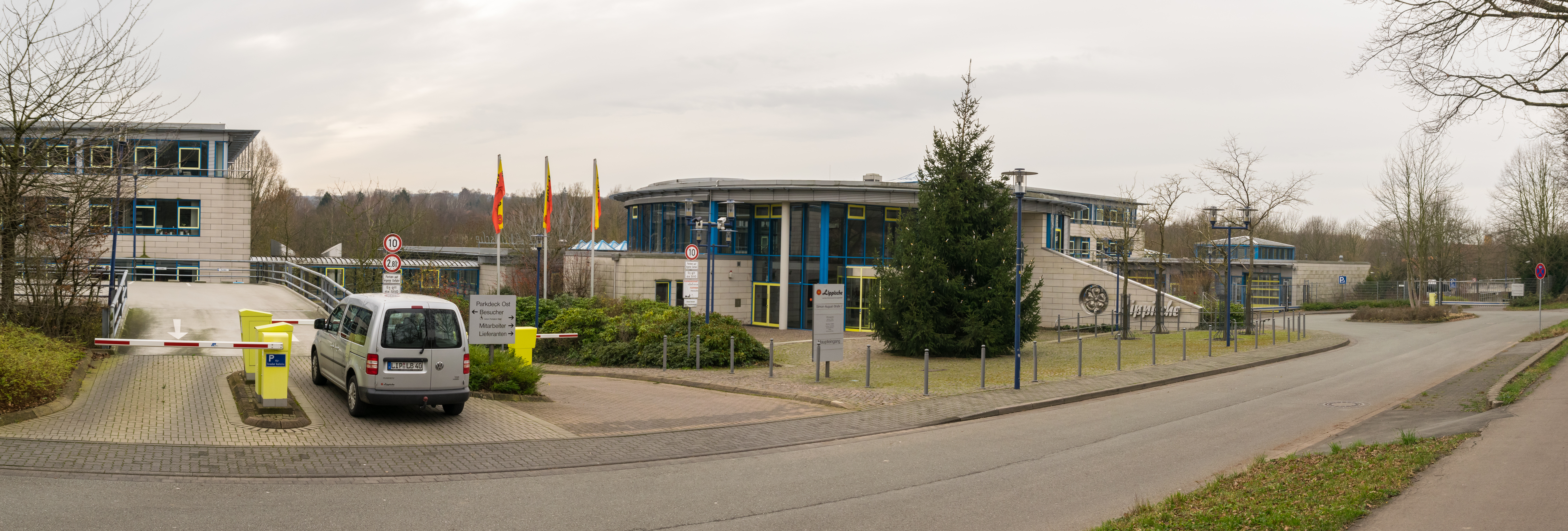 Zentrale der Lippisches Landes-Brandversicherungsanstalt in Detmold